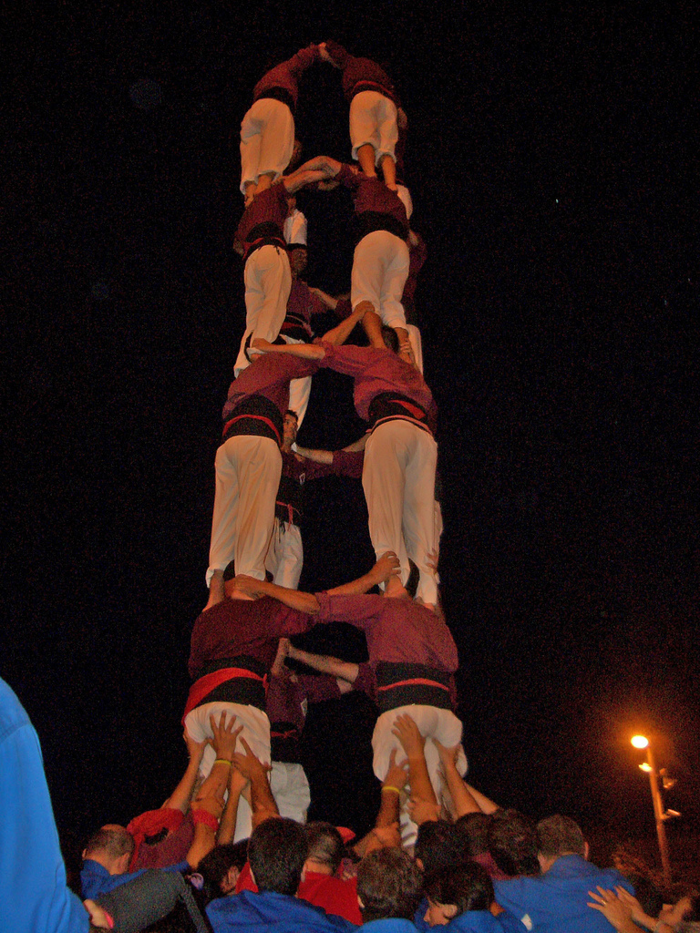 Els sitgetans van acabar amb aquesta prova de 4 de 8 a plaça